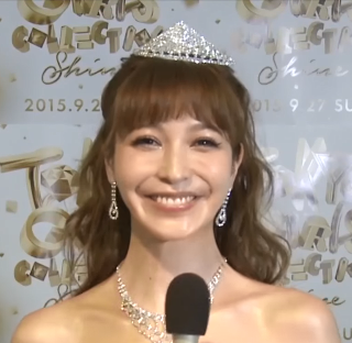 藤井リナです。